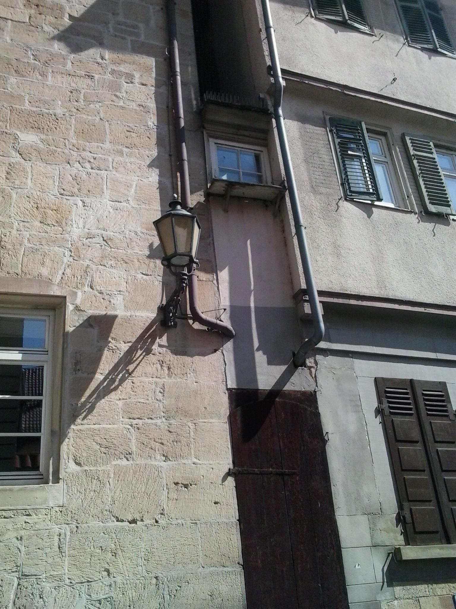 Einer der zwei Aborterker des ehemaligen Bebenhäuser Pfleghofs in Esslingen. Gut sichtbar von der Heugasse.